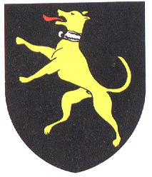 Wappen von Combremont le Grand Kanton Waadt Schweiz